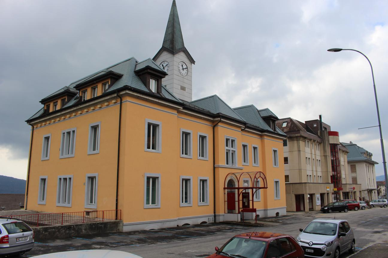 Bâtiment Epervier 6 (Hôtel-de-Ville), 4 (Cernier Centre) et 2 de la commune de Val-de-Ruz, 2053 Cernier, vue nord-est